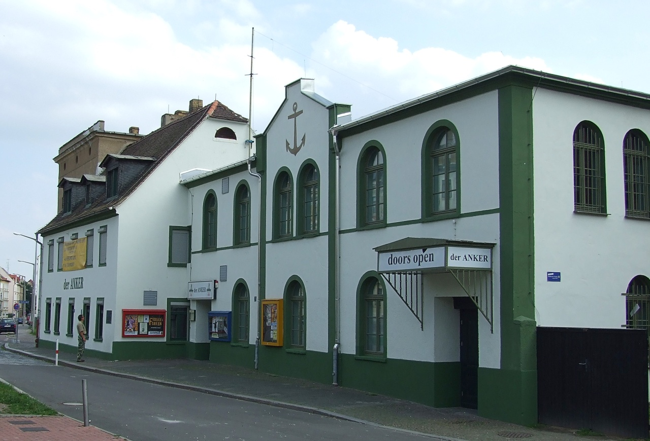 Der Anker in Leipzig-Moeckern